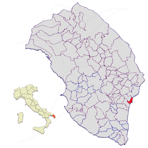 Il territorio del comune di Castro nella provincia di Lecce